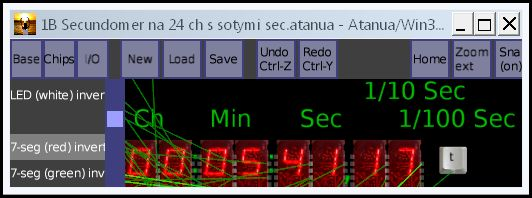 Снимок однокнопочного электронного секундомера в логическом симуляторе Atanua. Андрей Куликов